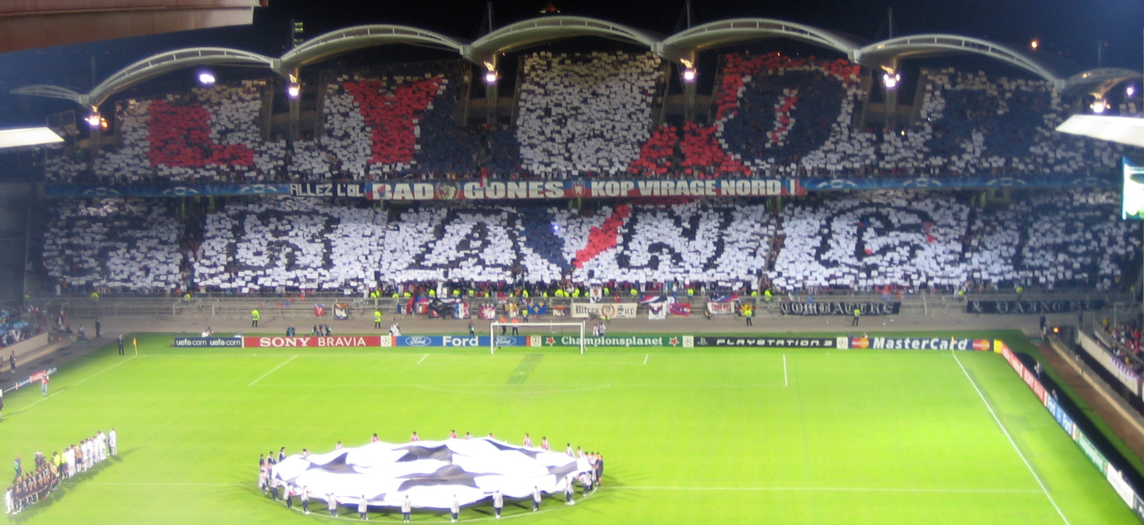 Перед матчем Лиги Чемпионов Лион - Реал Мадрид, 13 сентября 2006